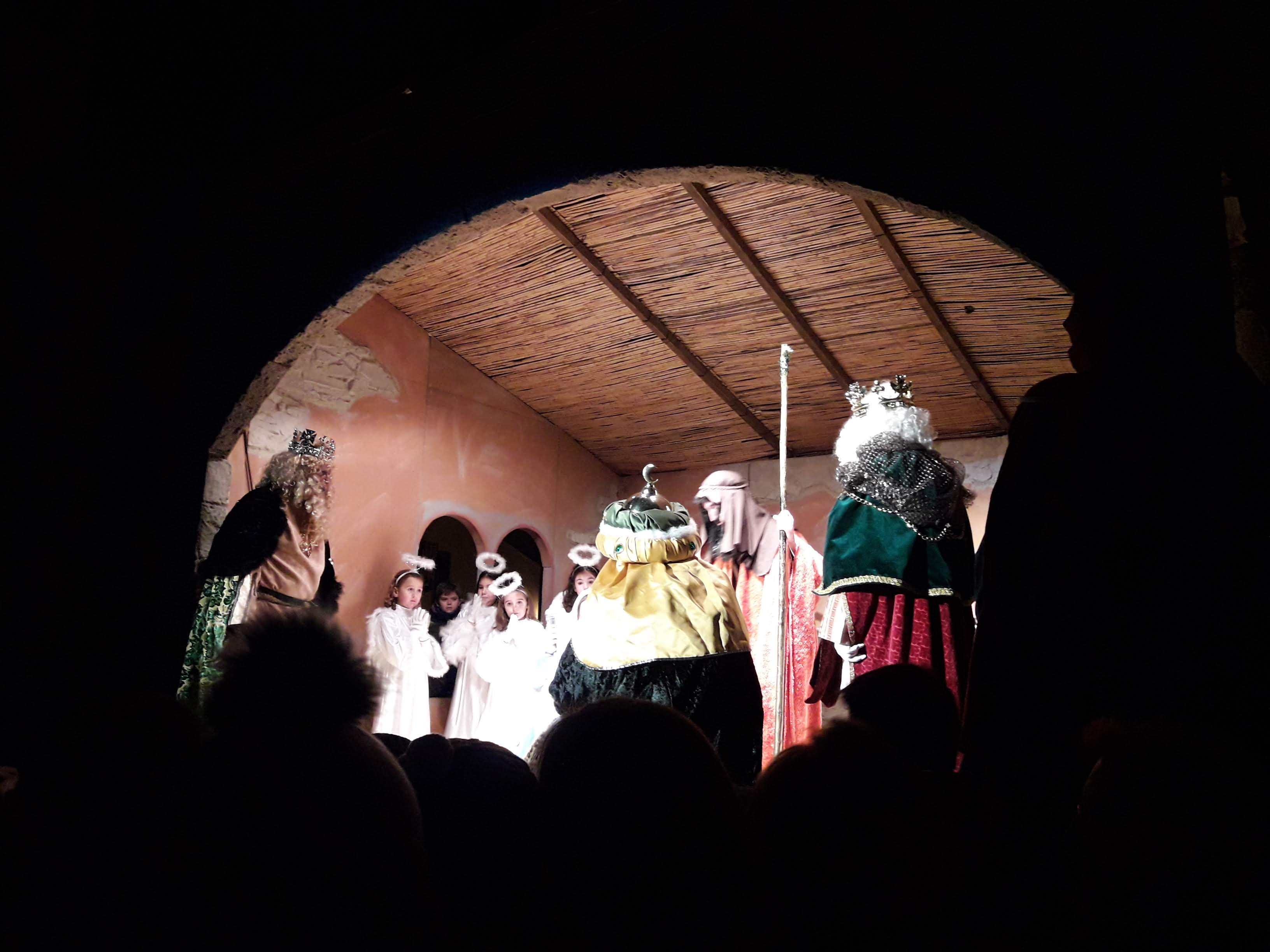 Visita dels Reis Mags a la Coveta del Betlem a la Plaça de l'església.